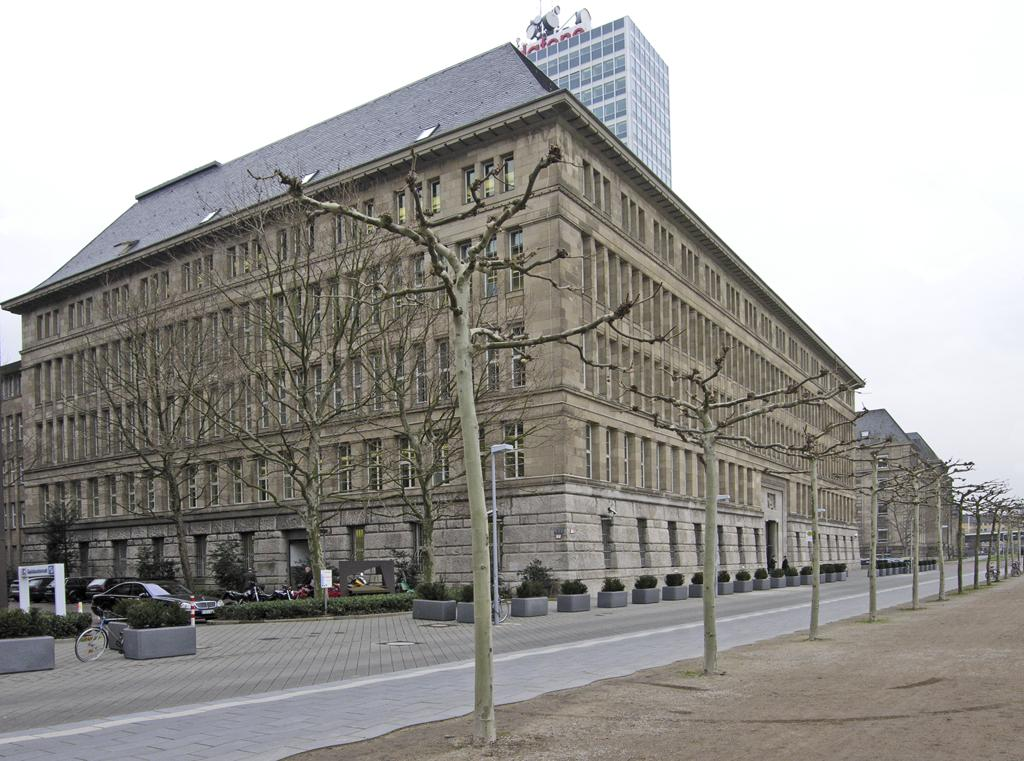 Beschreibung: Peter Behrens: Düsseldorf, Hauptverwaltungsgebäude Mannesmann (heute Vodafone) Datum: 17.01.2005 Fotograf: Hans Peter Schaefer Url: Lizenz: 19:44, 2. Feb 2005 Hps-poll 1024 x 761 (127909 Byte)